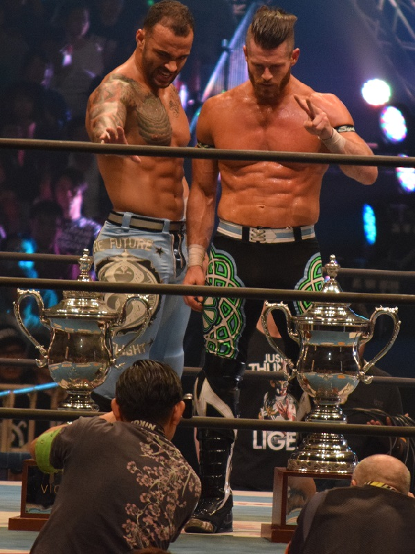 2015年11月7日 大阪府立体育会館 「POWER STRUGGLE」 スーパー・ジュニア・タッグ・トーナメントを制したリコシェ（左）とマット・サイダル（右）